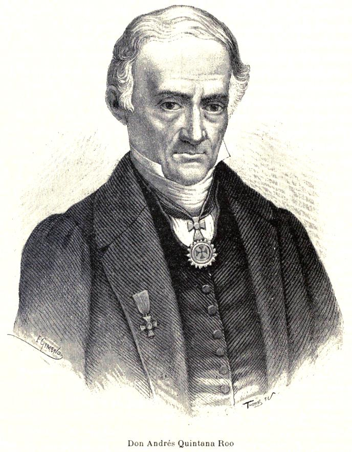 Imagen extraida del libro de Vicente Riva Palacio, Julio Zárate (1880) "México a través de los siglos" Tomo III: "La guerra de independencia" (1808 - 1821)